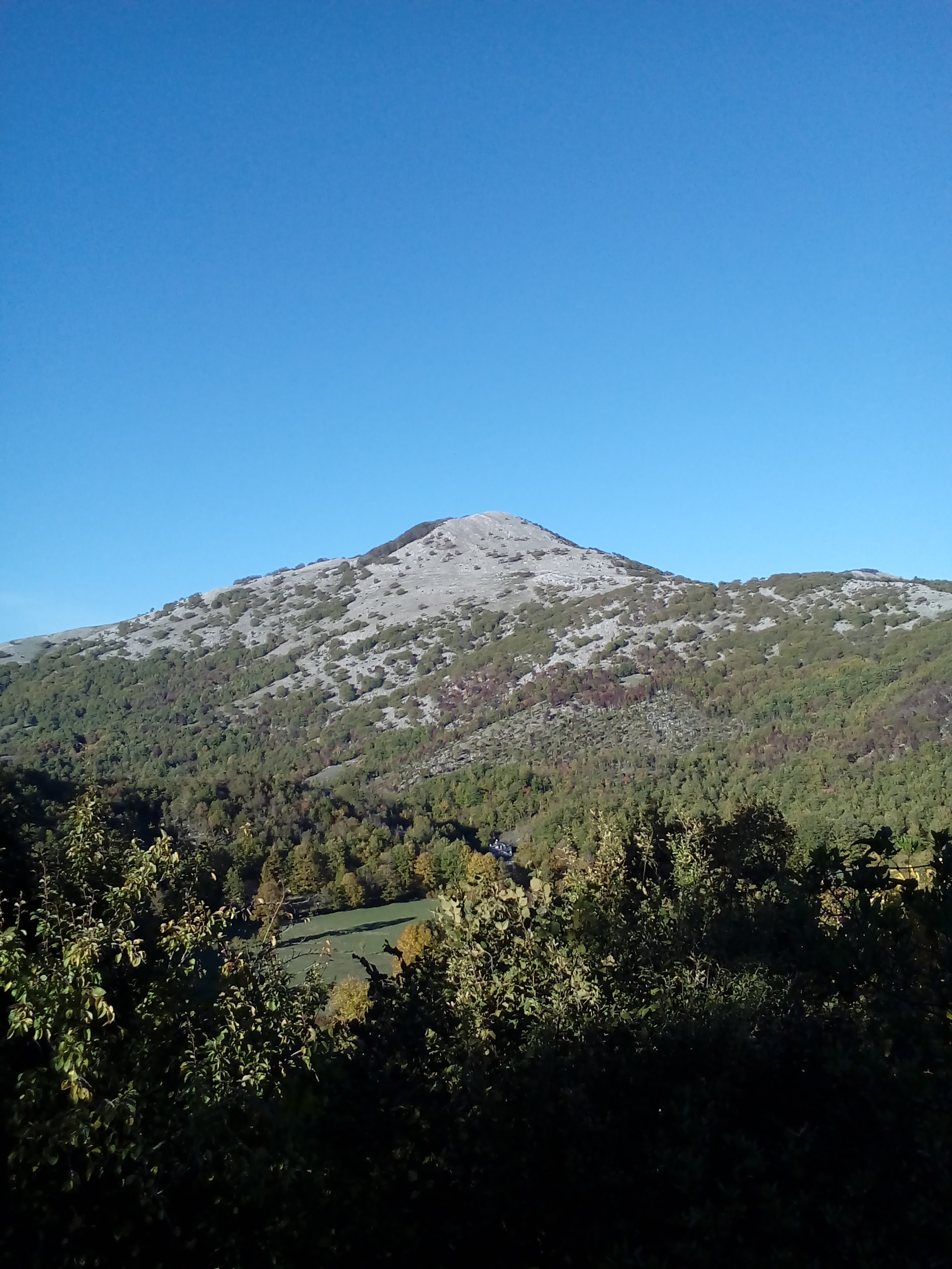 Veduta del monte Monna dalle mura del borgo di Acquafondata